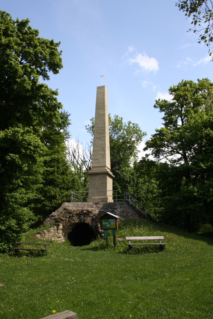 Obelisk auf 441 m Höhe, in der Ortschaft Hadersfeld, Marktgemeinde St. Andrä-Wördern